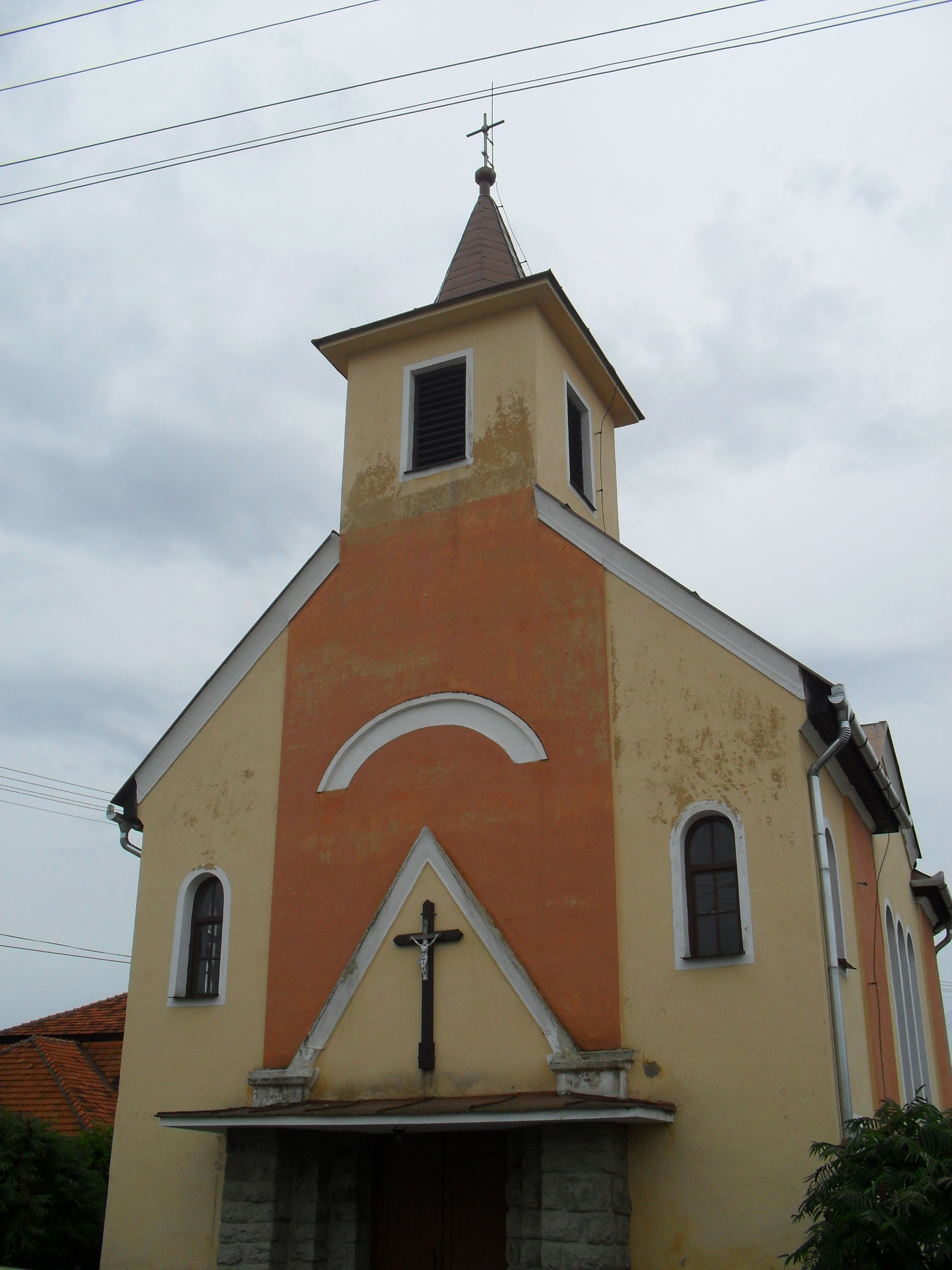 Gömörpanyit - katolikus templom